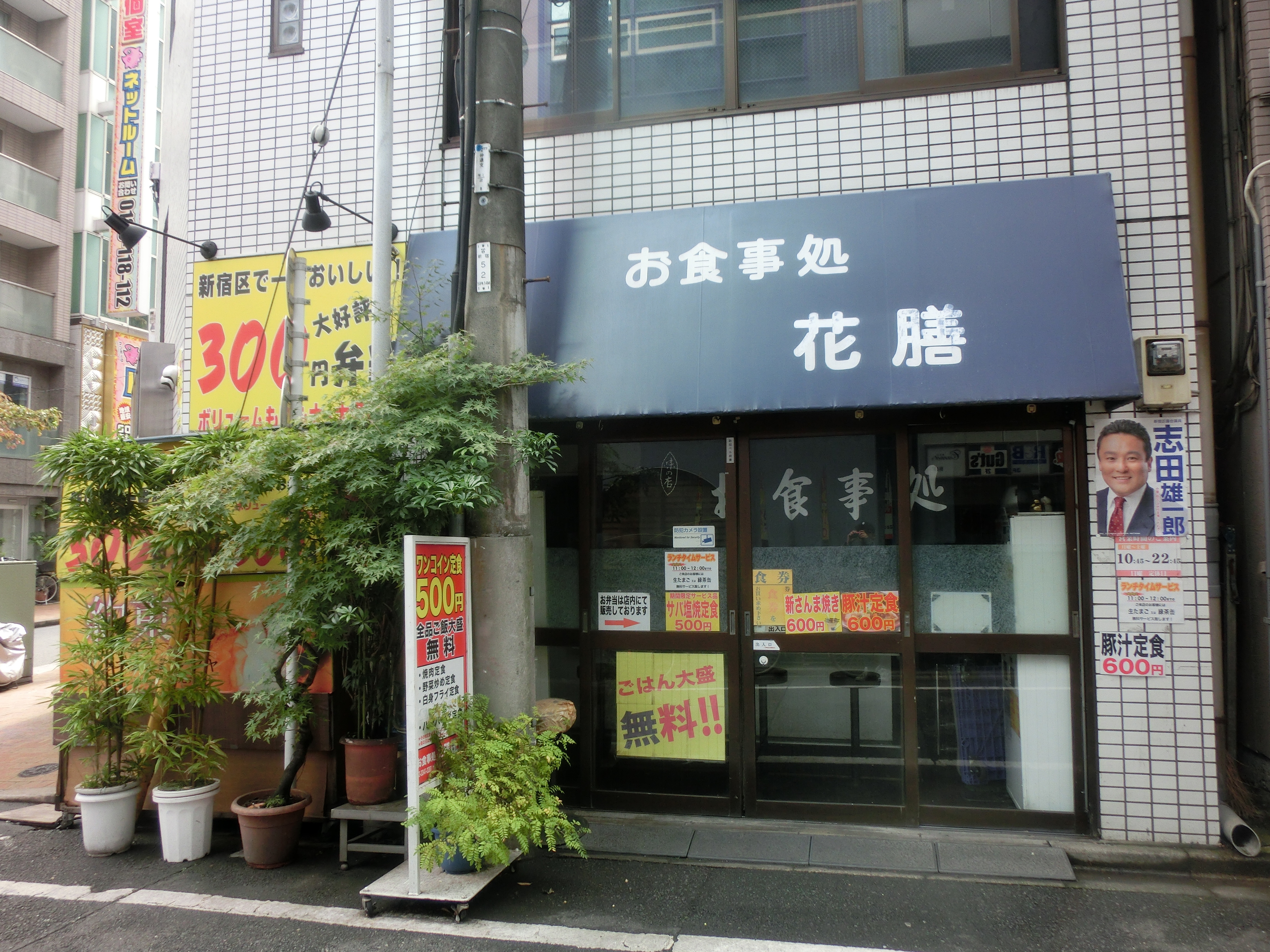 新宿・お食事処花膳（2018年）